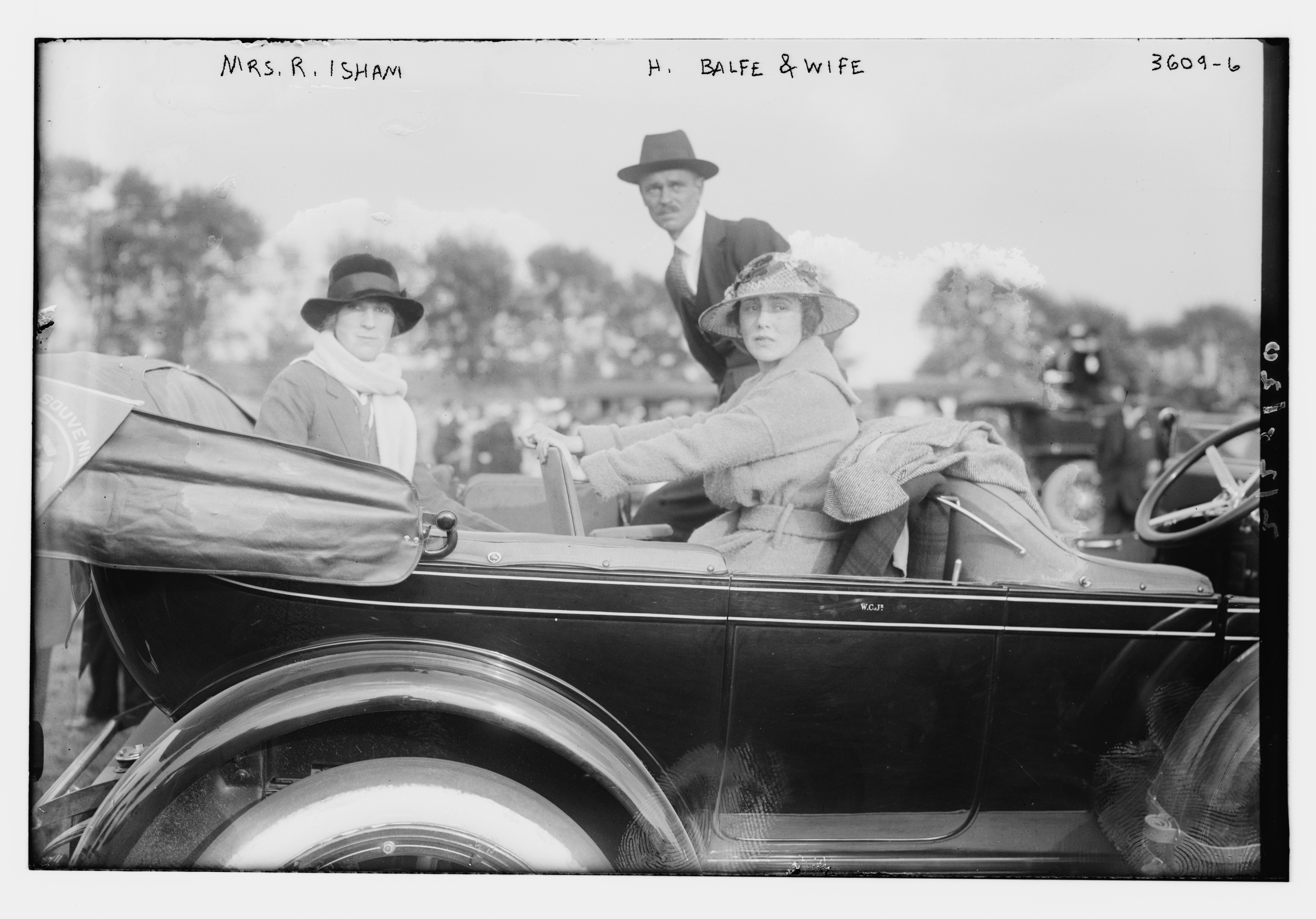 Mrs. R. Isham (Marion Gaynor; Tochter des Bürgermeisters William Jay Gaynor), Harry Russell Balfe und Ehefrau Veronica Balfe, geborene Gibbons (Schwester von Cedric Gibbons)